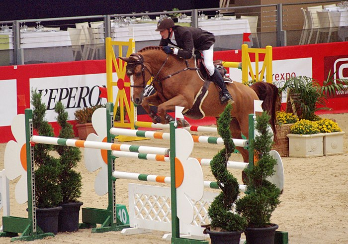 Kevin Staut et Banda de Hus, lors du Prix French Tour EADS du CSIW-5* d'Equita Lyon (octobre 2011).